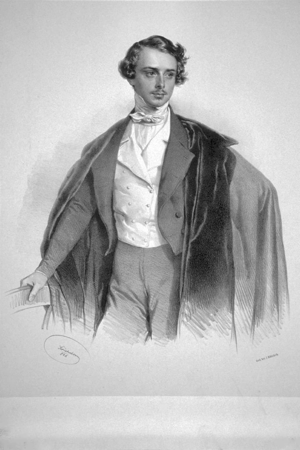 Odo Russell (1829-1884), 1. Baron of Ampthil, britischer Diplomat, Lithographie von Josef Kriehuber, 1846